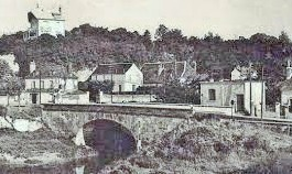 Extrait d'une ancienne photographie du pont de La Motte, ouvrage d'art franchissant les deux rives de la Loire entre les communes de La Riche et Fondettes, près de Tours, Indre-et-Loire.